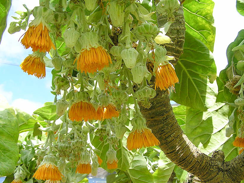 Dendroseris littoralis = Sonchus brassicifolius - Cabbage tree - Islas de Juan Fernández, Chile.